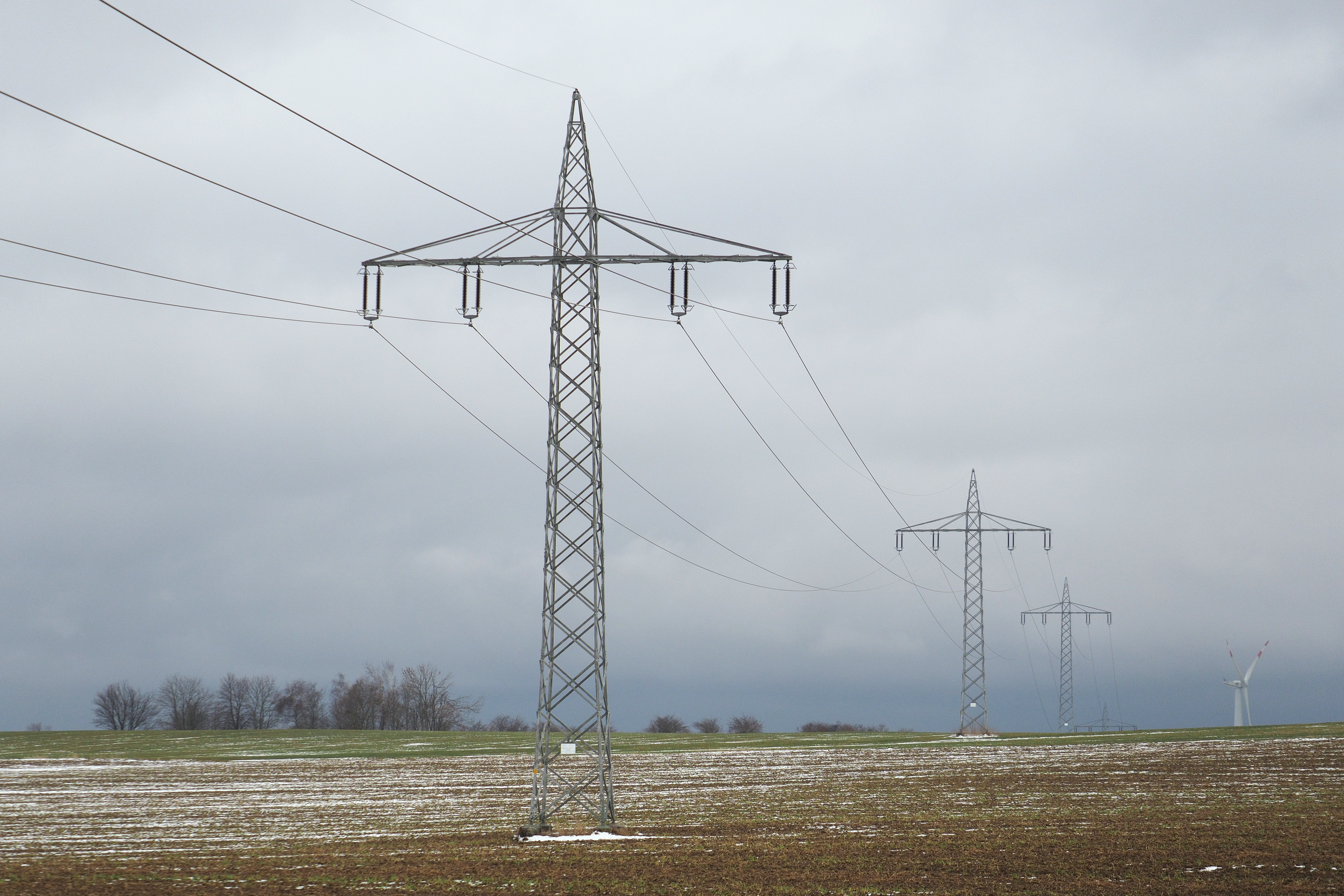 Bahnstromleitung bei Lauterburg, Schwäbische Alb; Leitungsbezeichnungen: Amstetten–Aalen und Amstetten–Osterburken. Vorn im Bild ist Mast 2700, dahinter 2701 etc.